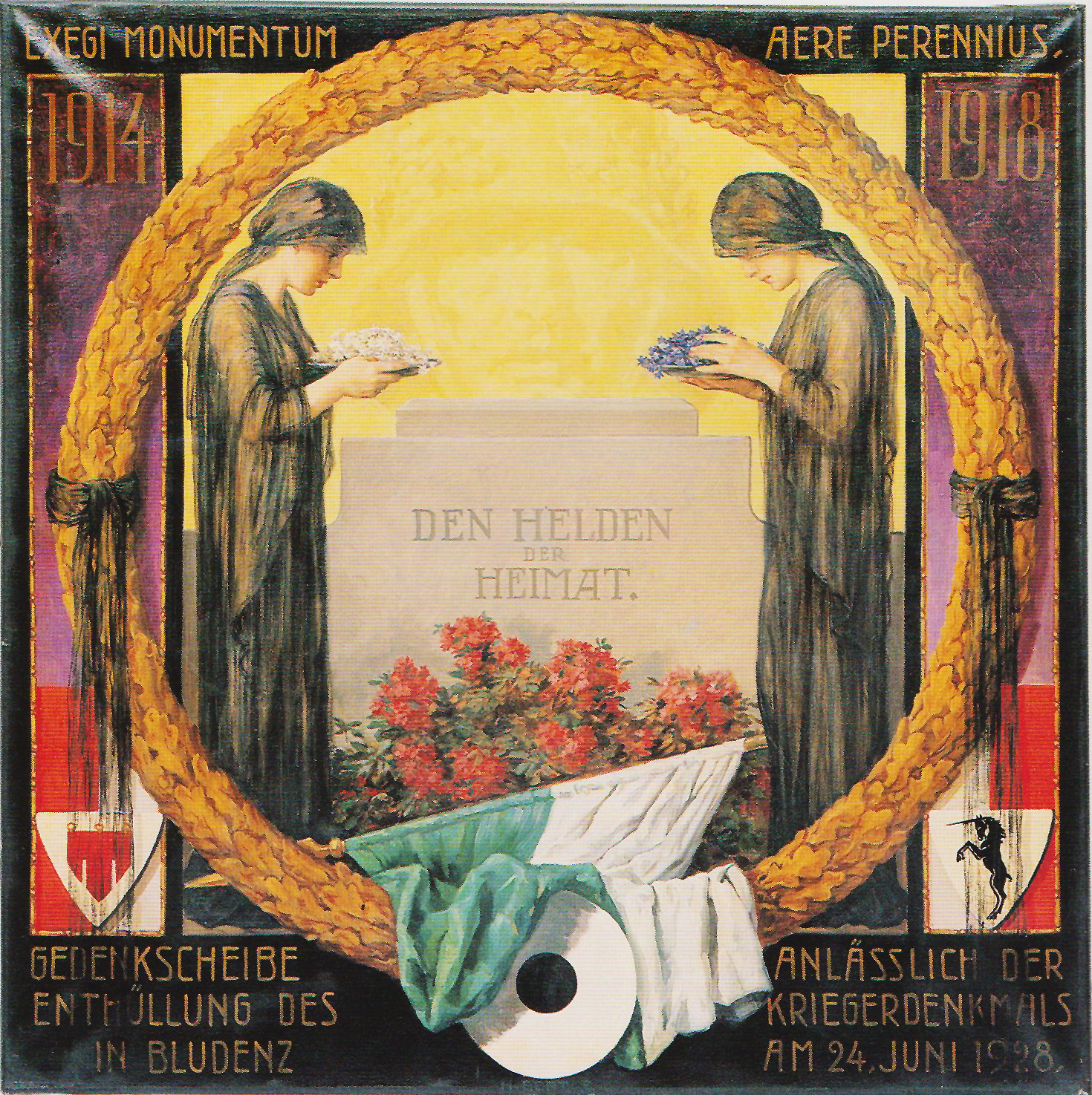 Bild "Kriegerdenkmal 1928" von 1928